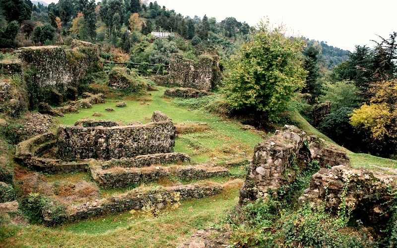 პეტრა. ციხისძირი